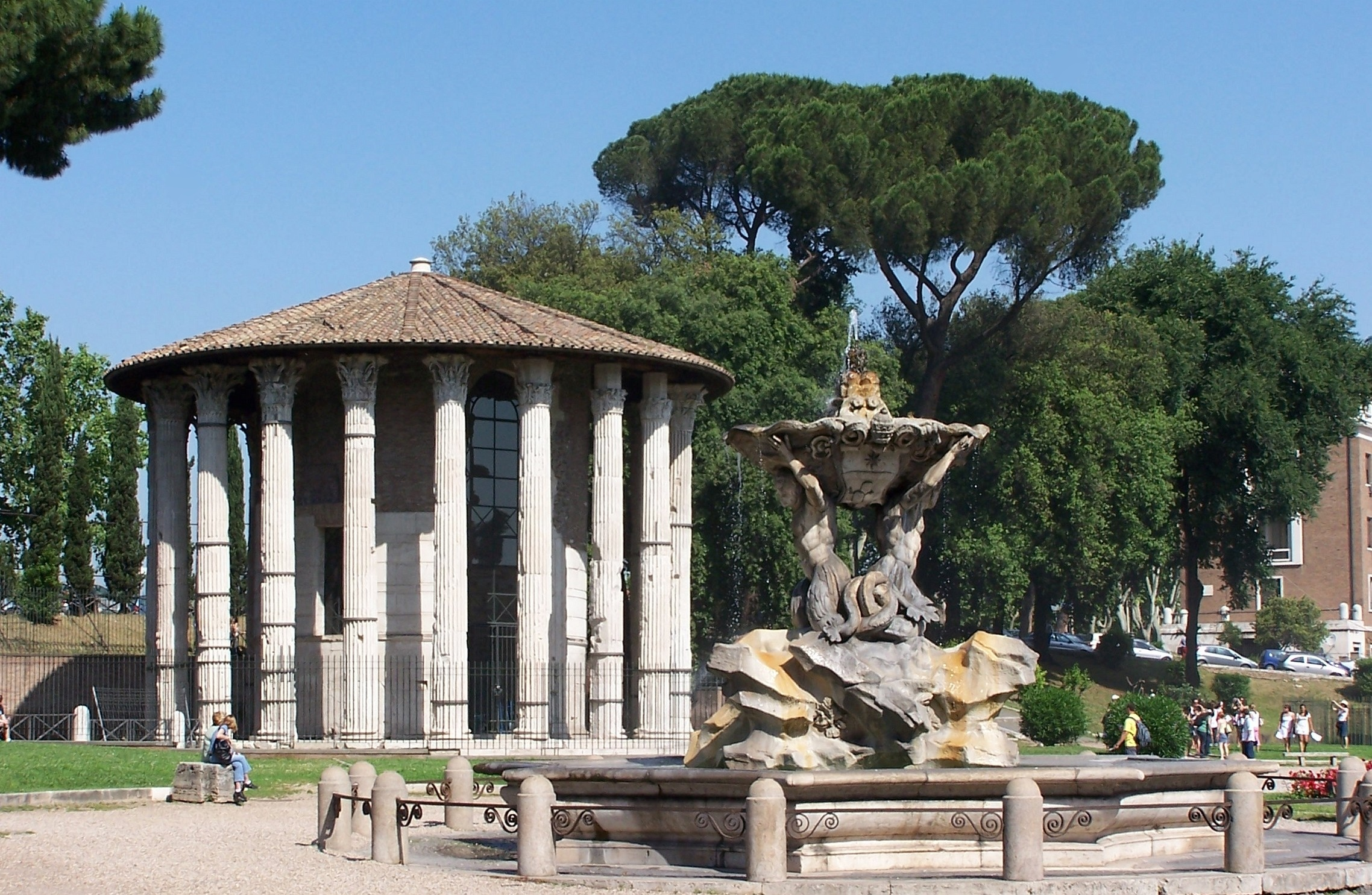 Rom Tempel des Hercules